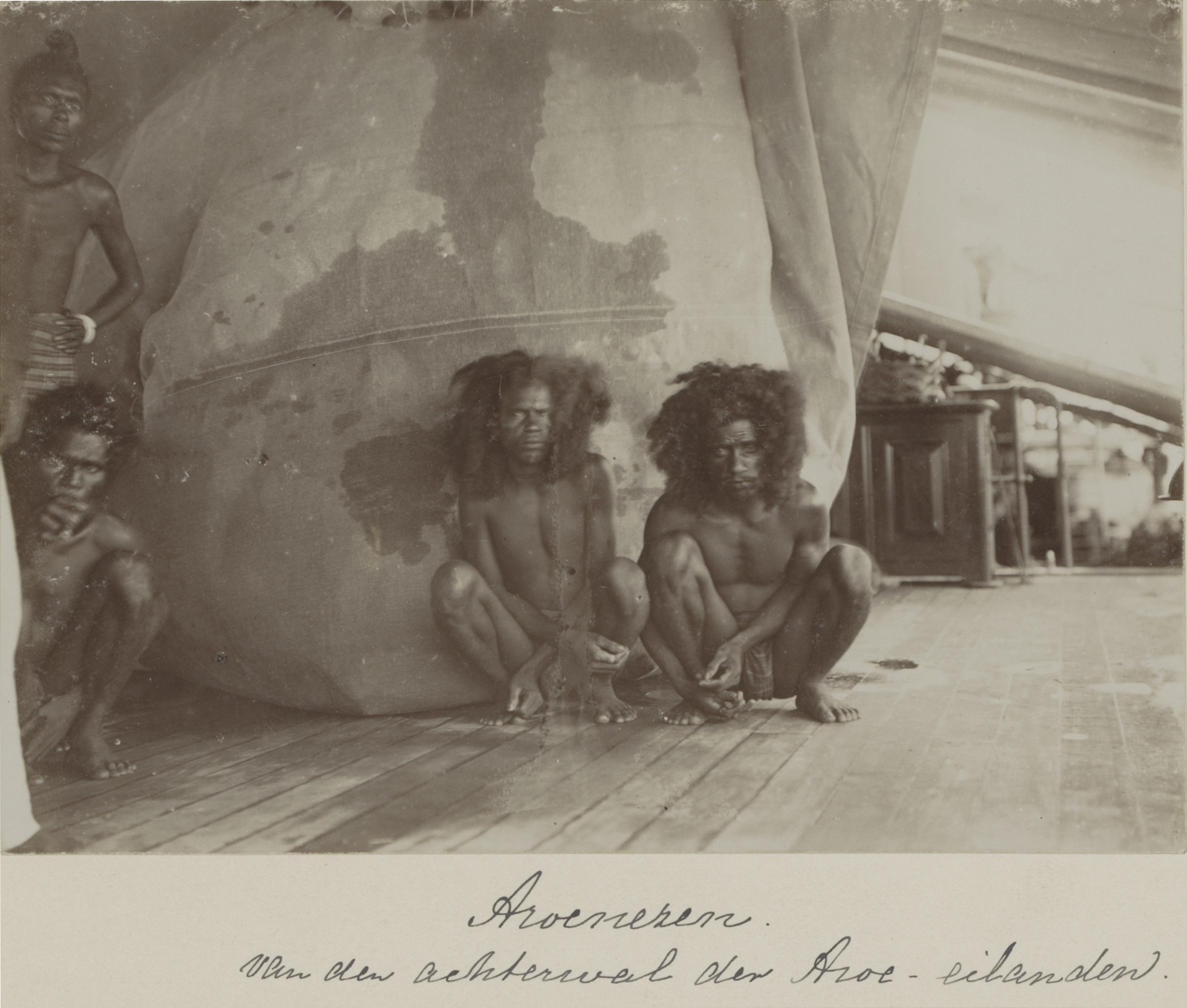 Academische Collecties: 1899-1900, Siboga-expeditie naar Nederlands Oost-Indië, onder leiding van Max Wilhelm Carl Weber De gefotografeerde Arunezen zijn afkomstig van de Achterwal van de Aru-Eilanden, dat is de oostkust van deze eilanden.